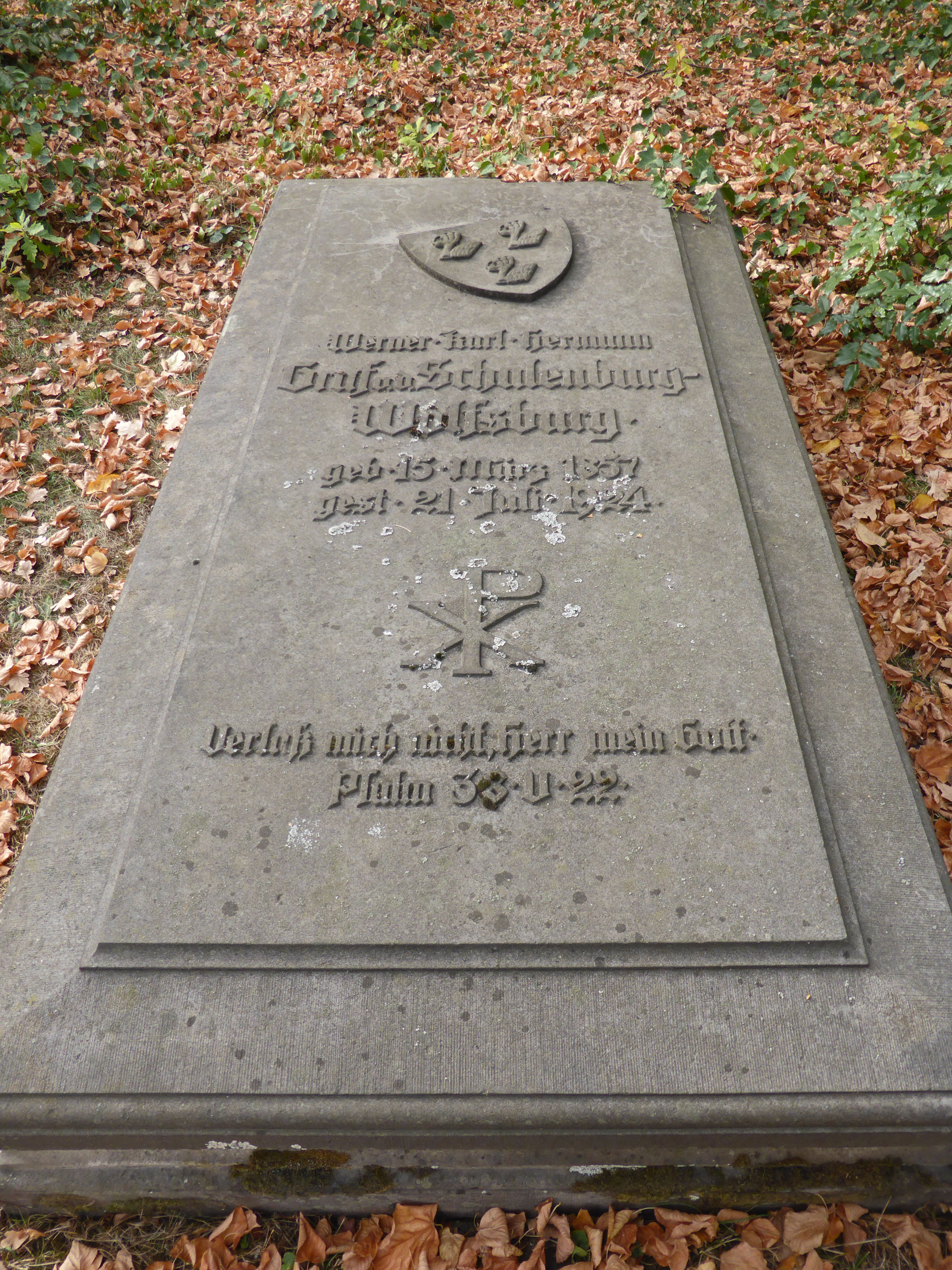 Grabmal von Werner Karl Hermann Graf von der Schulenburg-Wolfsburg auf dem Friedhof in Wolfsburg-Rothenfelde.